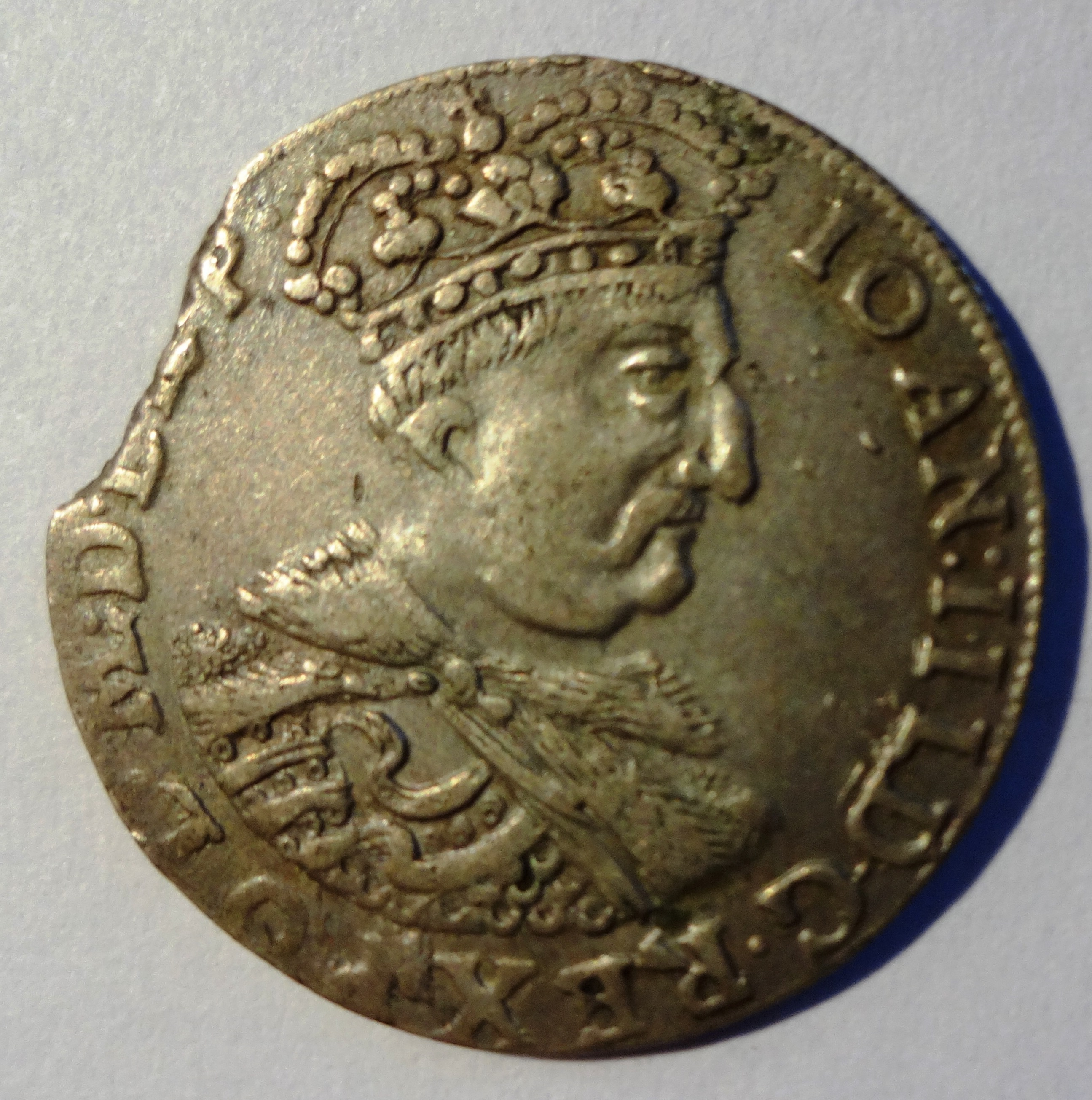 Johann Sobiesky auf VI Groschenmünze, geprägt 1683